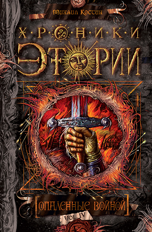 Обложка книги М. Костина «Хроники Этории. Опалённые войной».